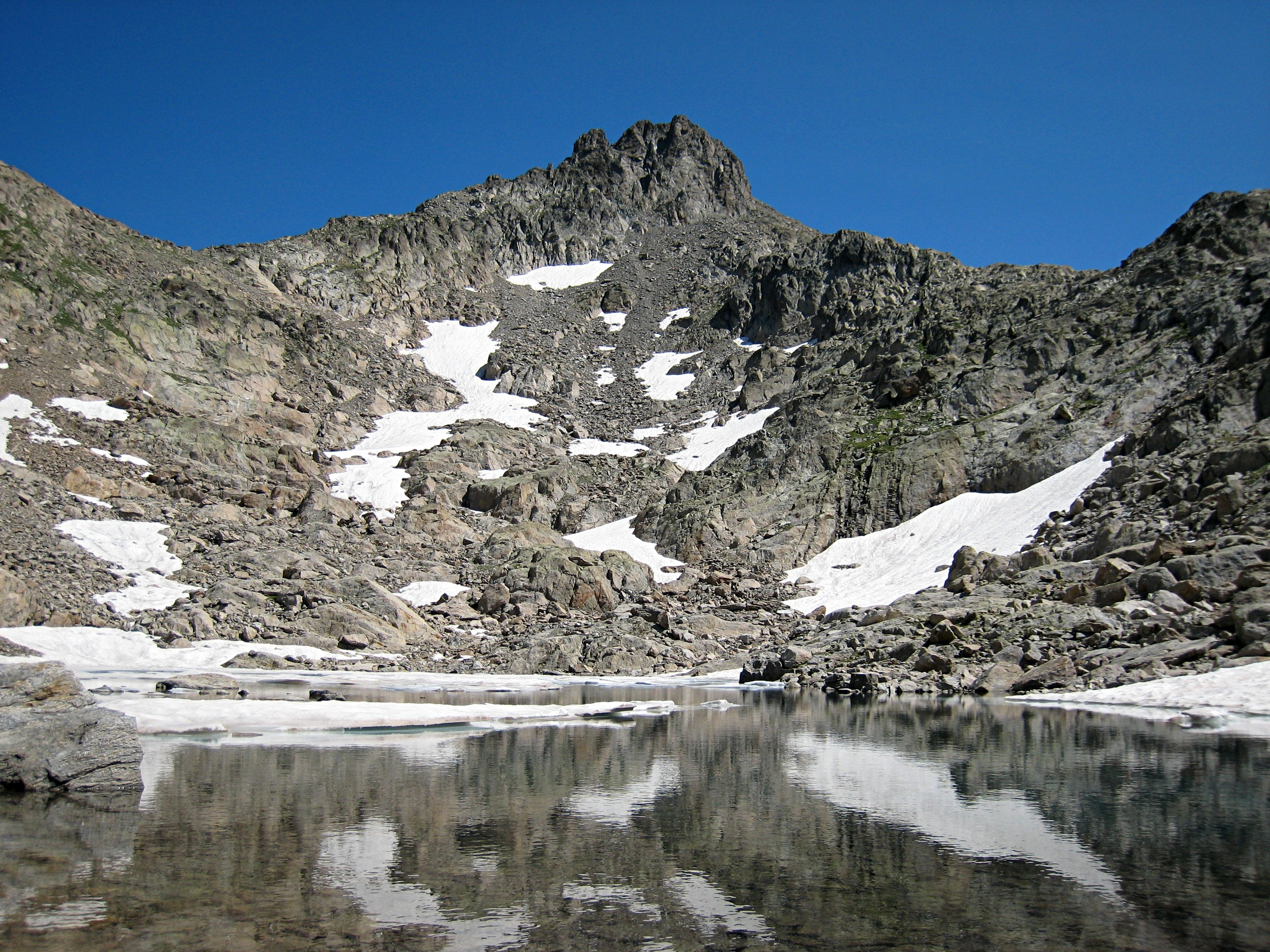 Lac et cime de l'Agnel